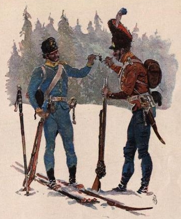 «Underoficerer ved skiløperne og grenadererne»